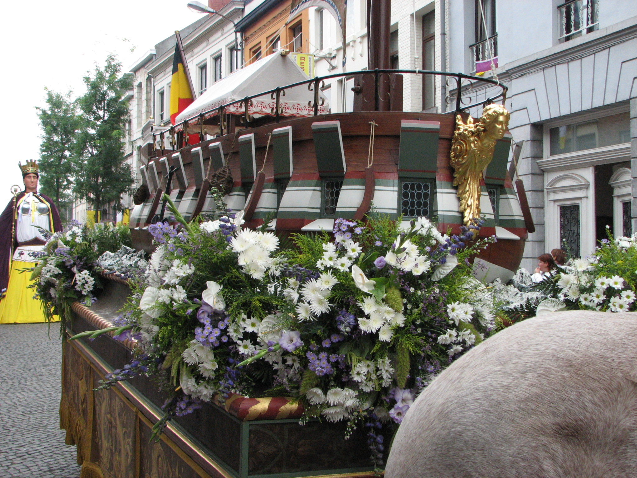 Le Char de la navigation, ducasse d'Ath, en 2006